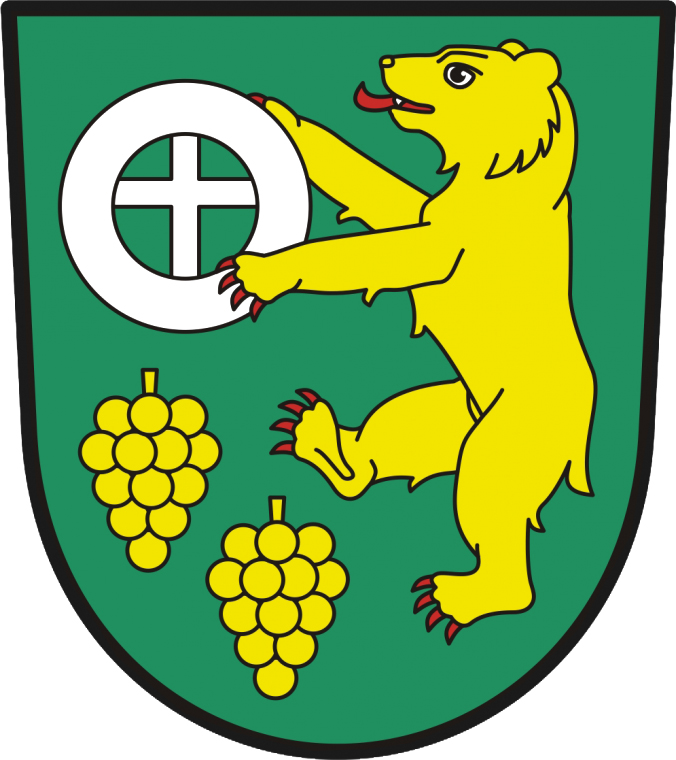 Zelený štít se zlatými hrozny a medvědem držící kruh se stříbrným latinským křížem. Znak byl schválen v roce 2015.